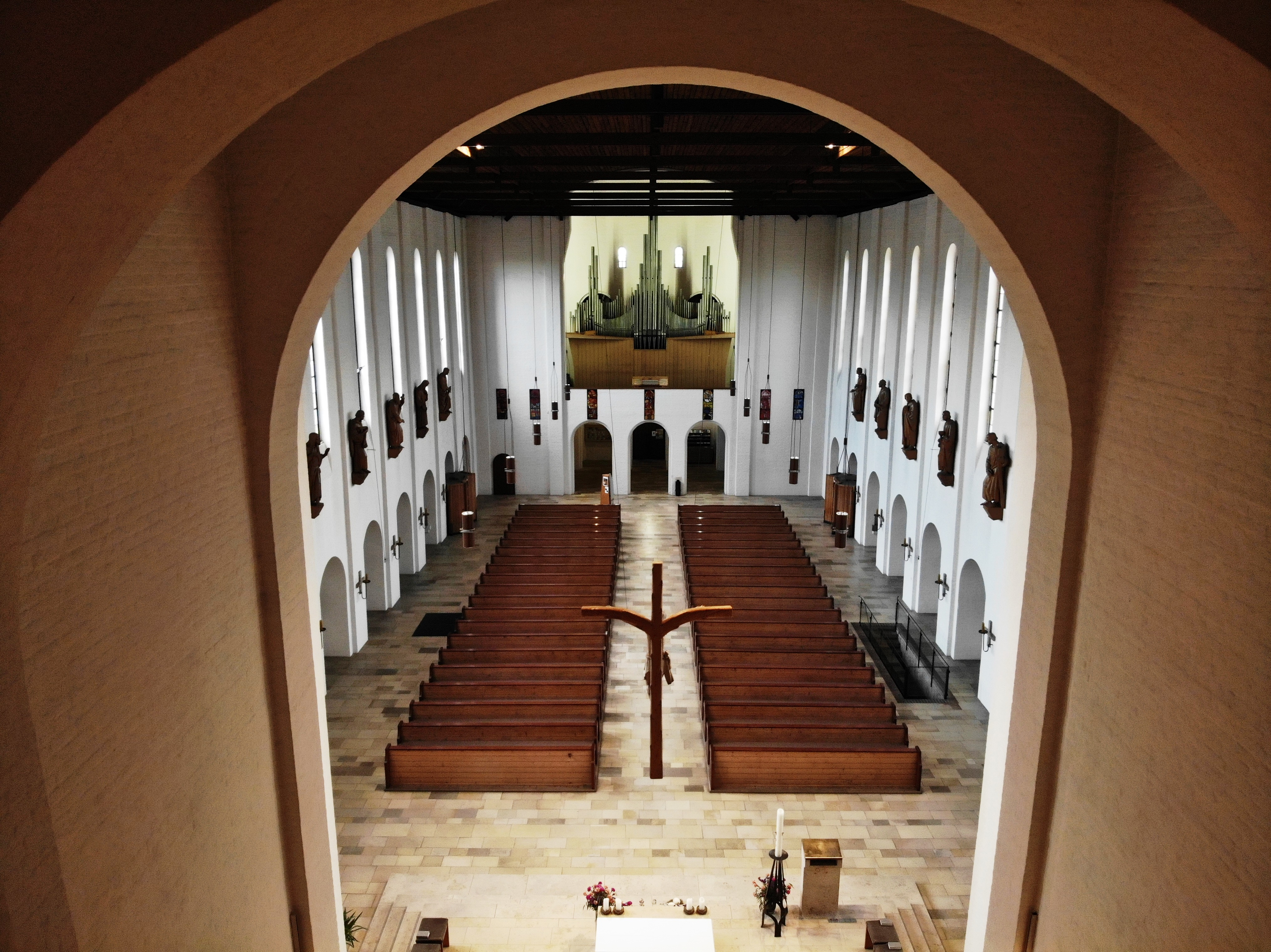 Blick aus dem Chorraum von Osten nach Westen